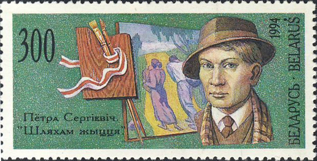 Беларуская (тарашкевіца): Пётар Сергіевіч